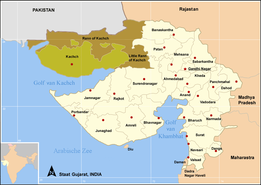 Eigen bewerking van bestand van Wikimedia Commons (:Bestand:Map GujDist Kuchchh.png).